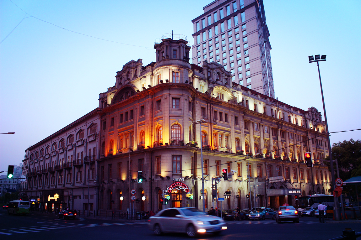 中文（中国大陆）: 上海浦江饭店